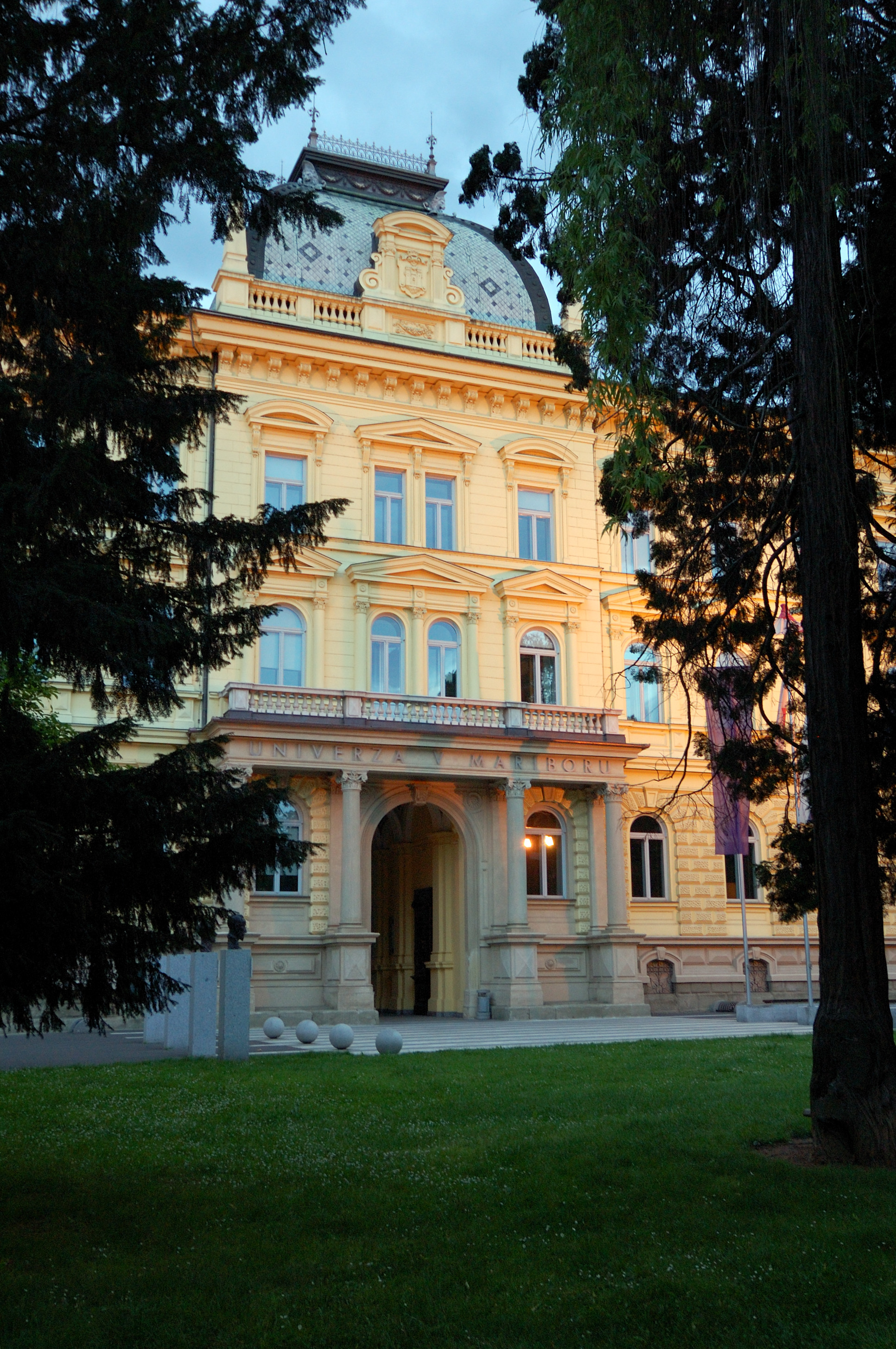 Maribor, Slovenia [2007]